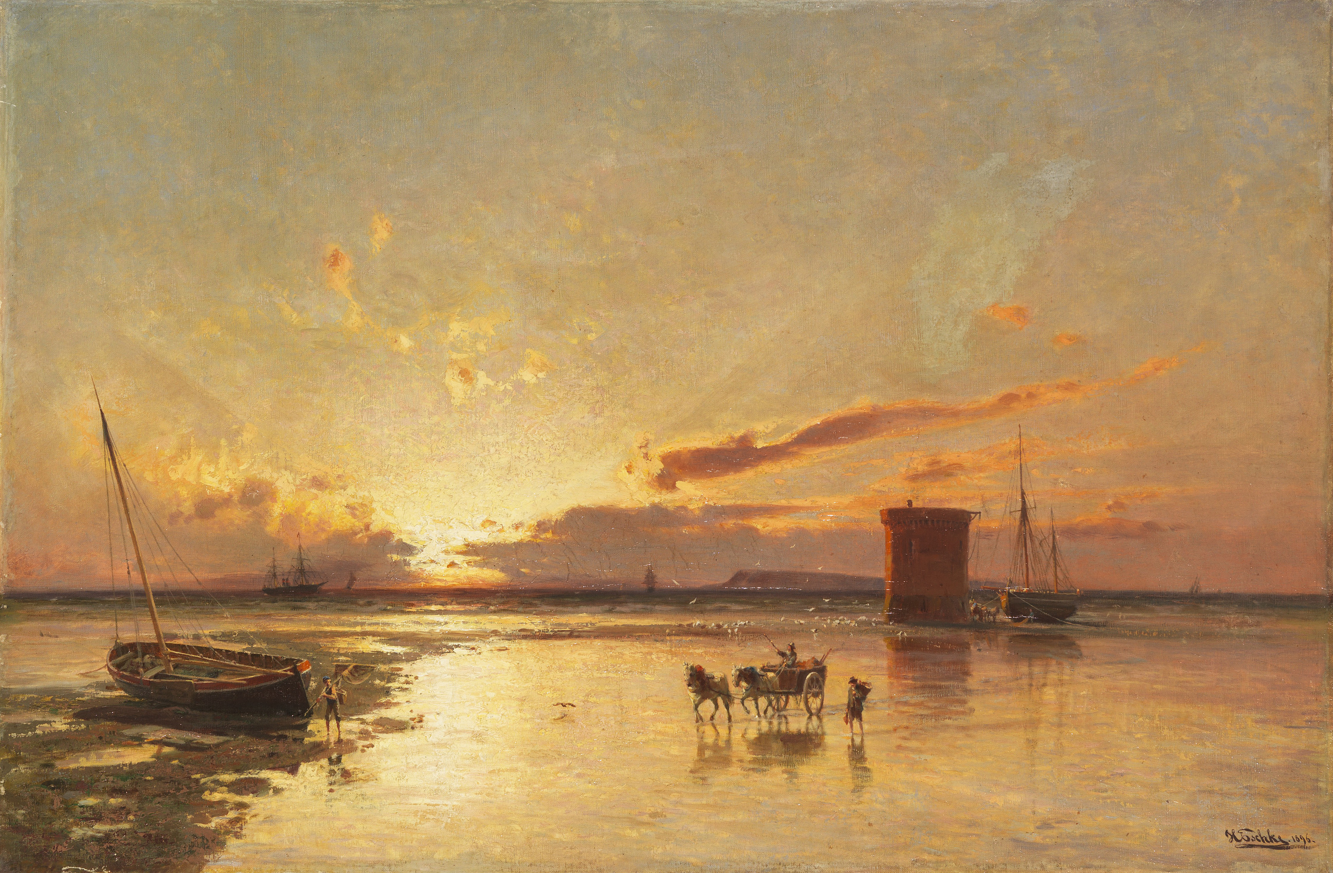 Martello-Turm an der Küste von Leith bei Edinburgh. Öl auf Leinwand. Rechts unten signiert und datiert. Verso auf dem Keilrahmen auf einem fragmentarischen Etikett handschriftlich in Tinte bezeichnet und betitelt. 66 x 100,7 cm